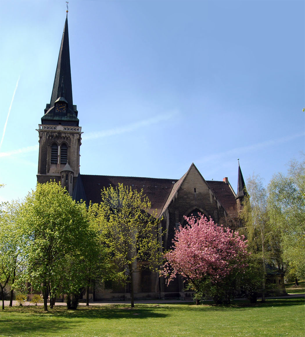 Thomaskirche (errichtet 1902) in der Schillerstraße in Erfurt